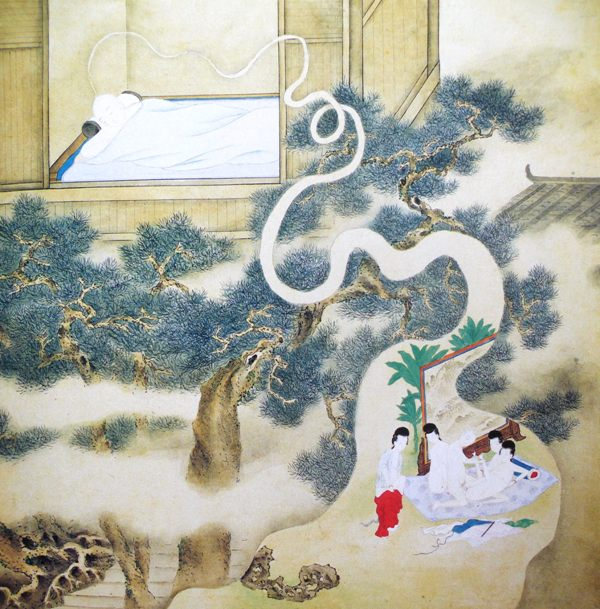 中文（香港）: 明代春宮圖